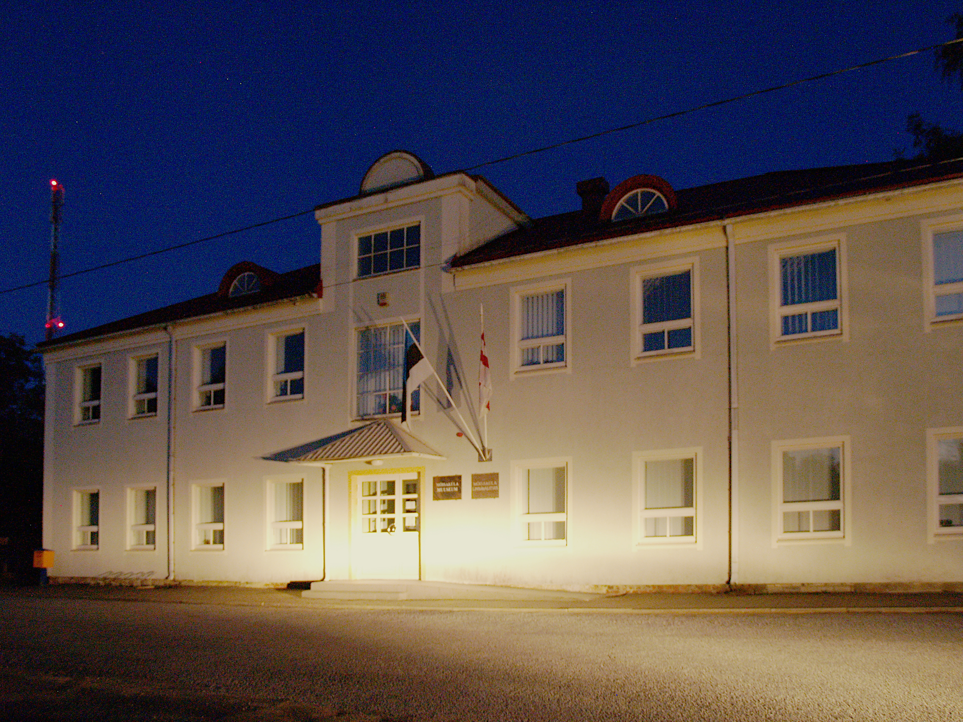 Mõisaküla linnavalitsuse hoone.